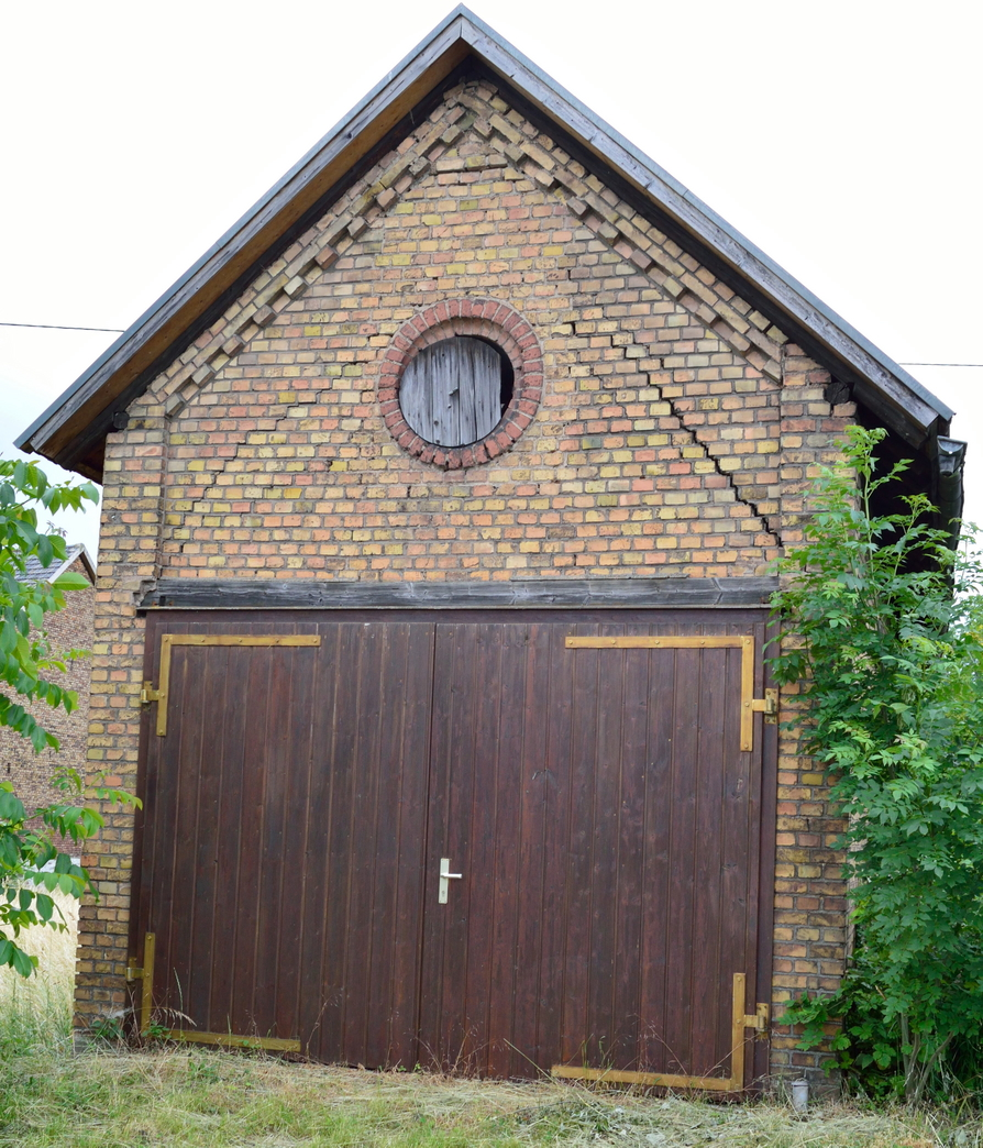 Jüdische Synagoge in Guldental, Naheweinstraße